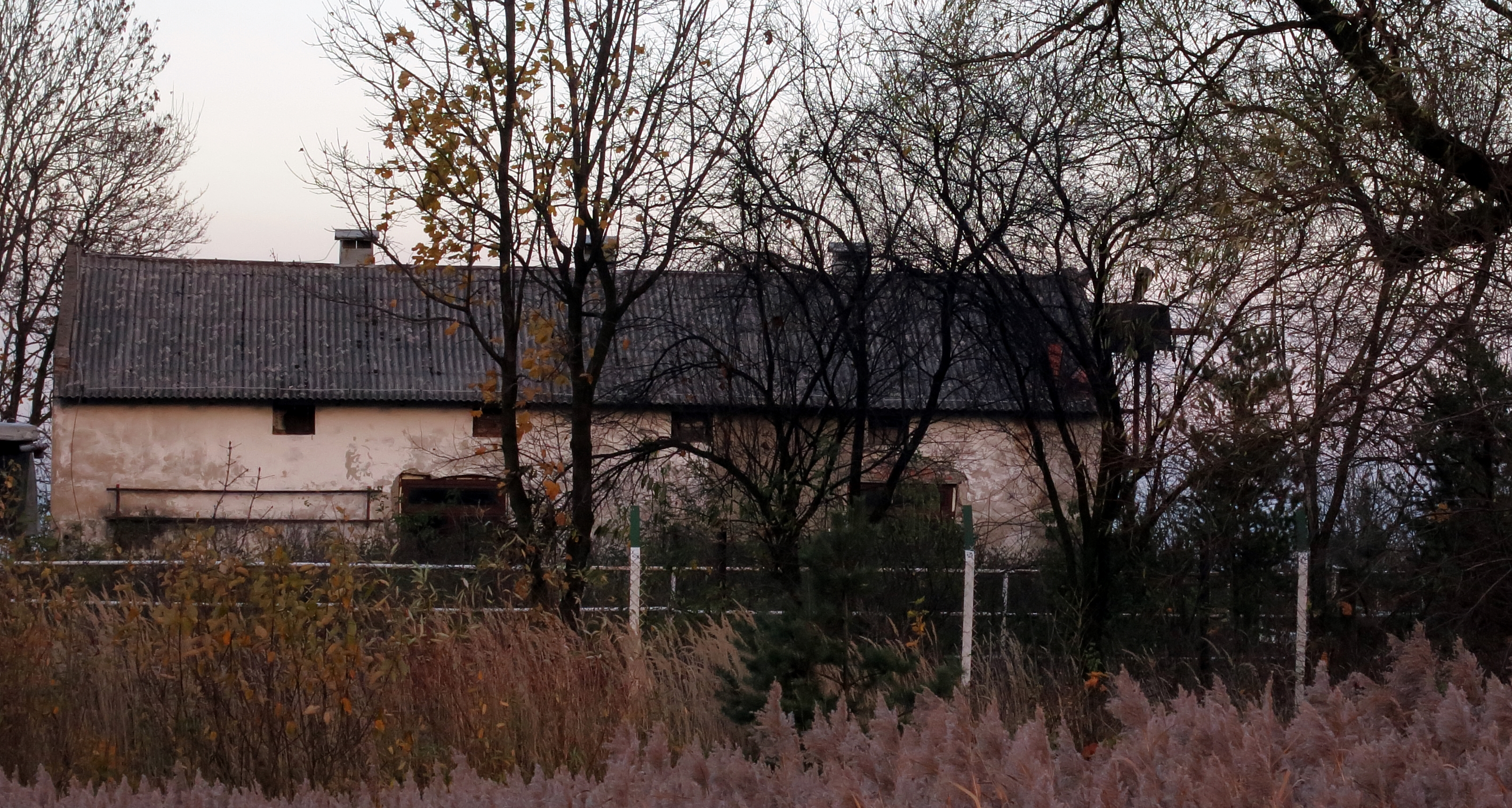 Bukowno, dwór